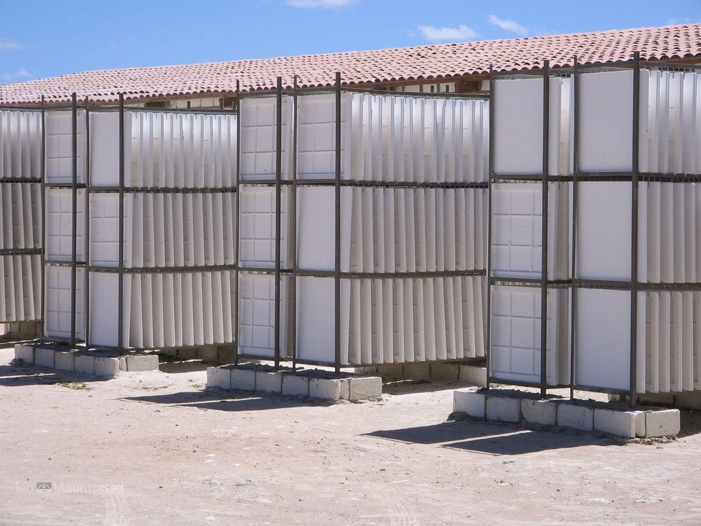 Sèchage de carreaux de plâtre à Trinidad, Cuba.